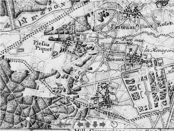 carte avec le Plessis, Aunay, châtenay et sceaux 1751